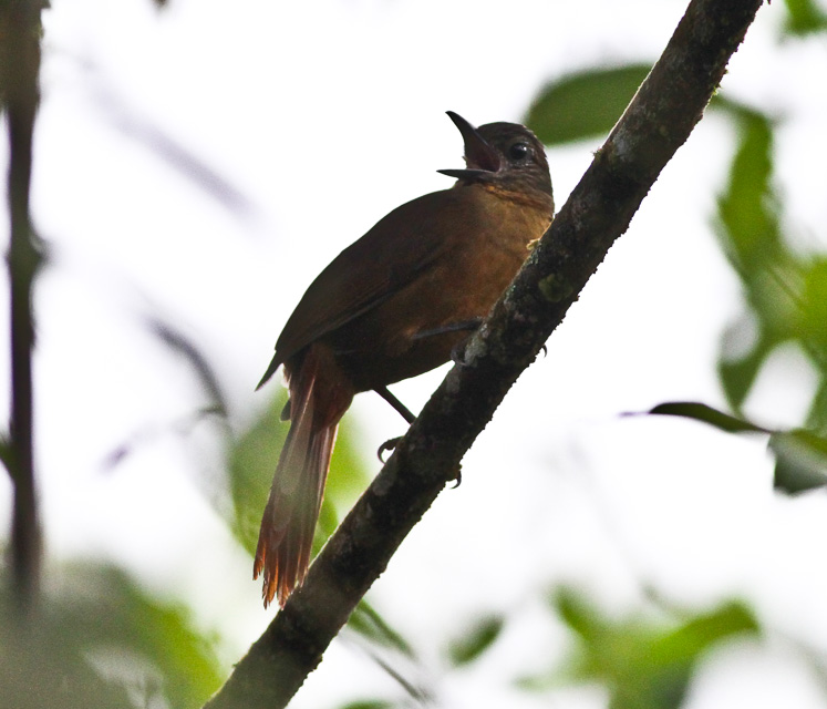 Libano